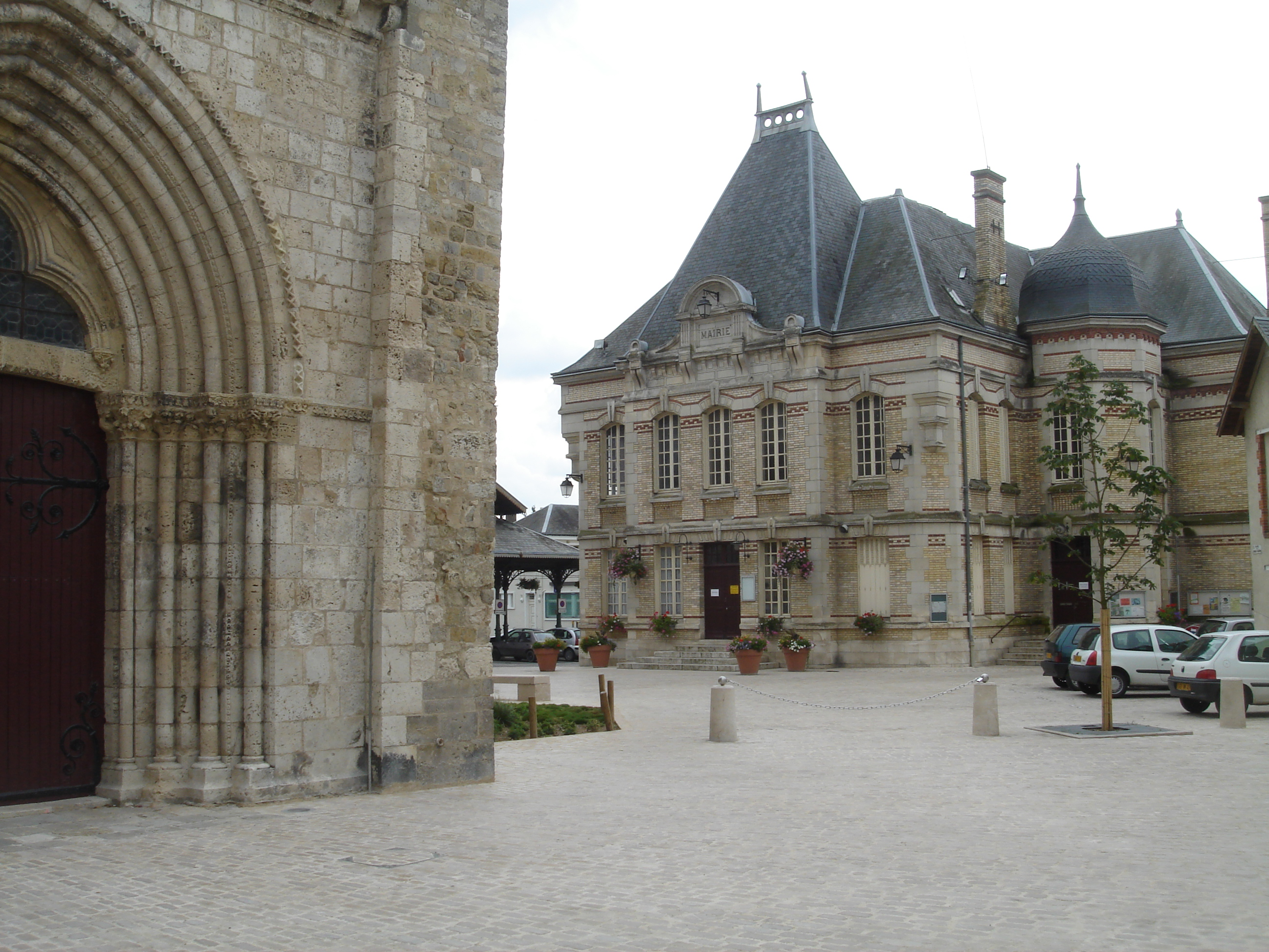 Mairie, place du Grand-Cloitre, Jargeau (Loiret), 2007